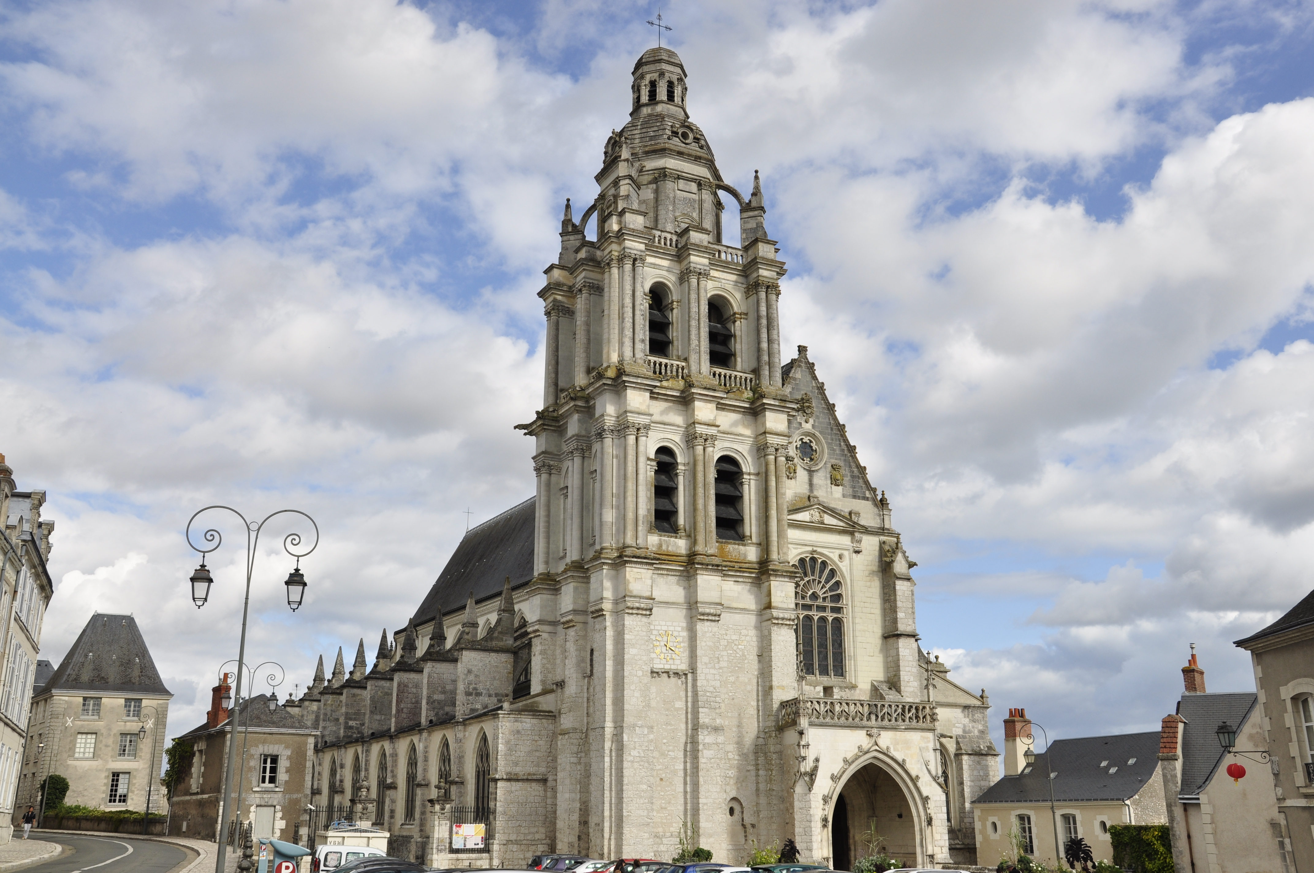 Cathédrale St Louis, Blois (41) .